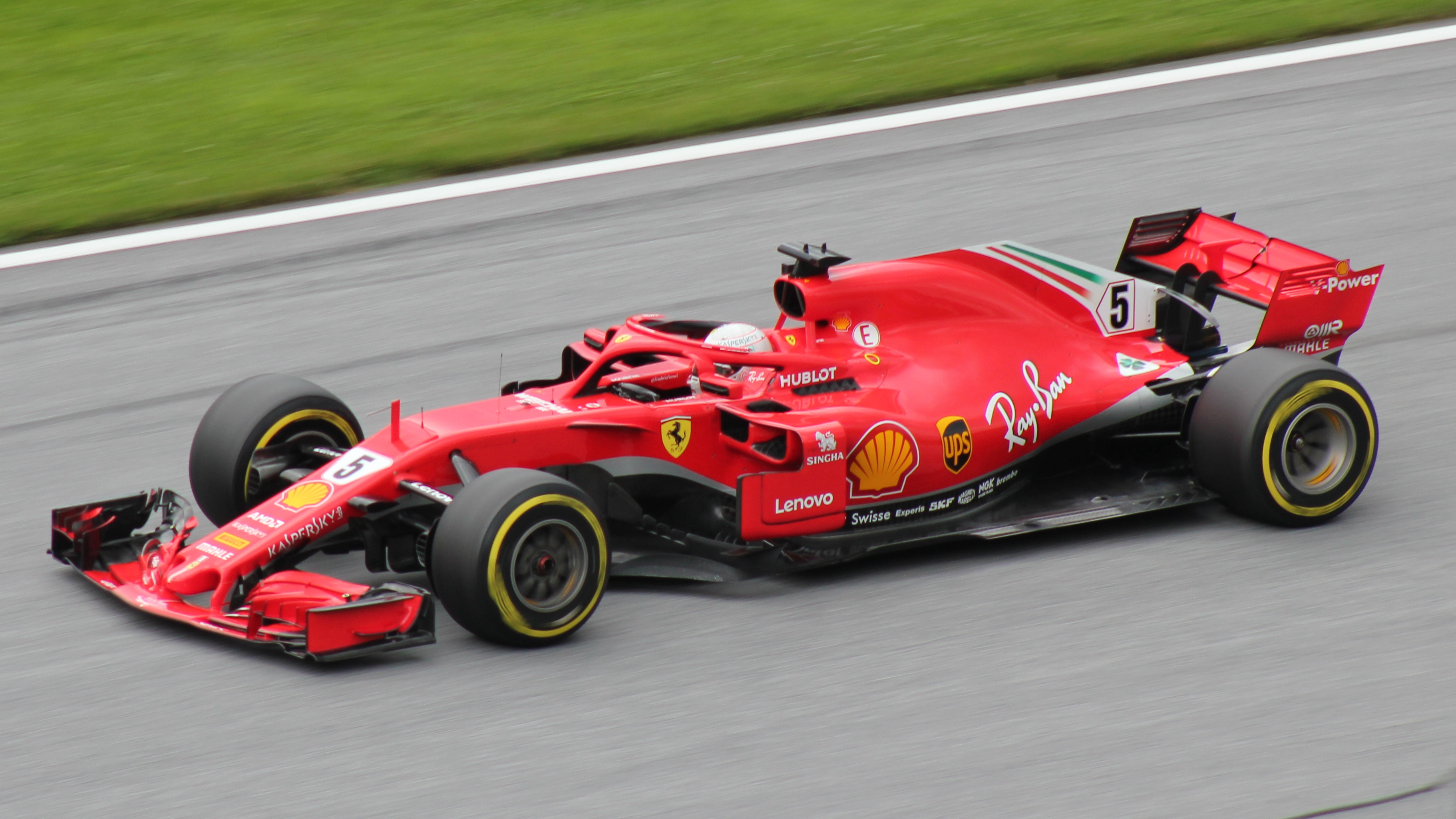 5 Vettel beim Rennwochenende in Österreich 2018